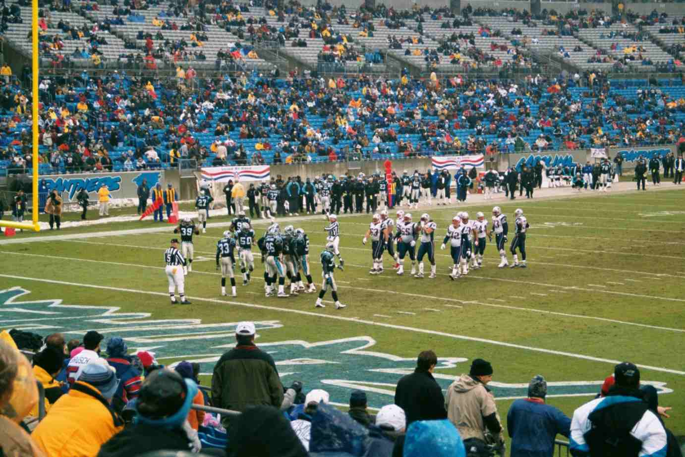 American Football (Charlotte 2002 Patriots-Panthers)